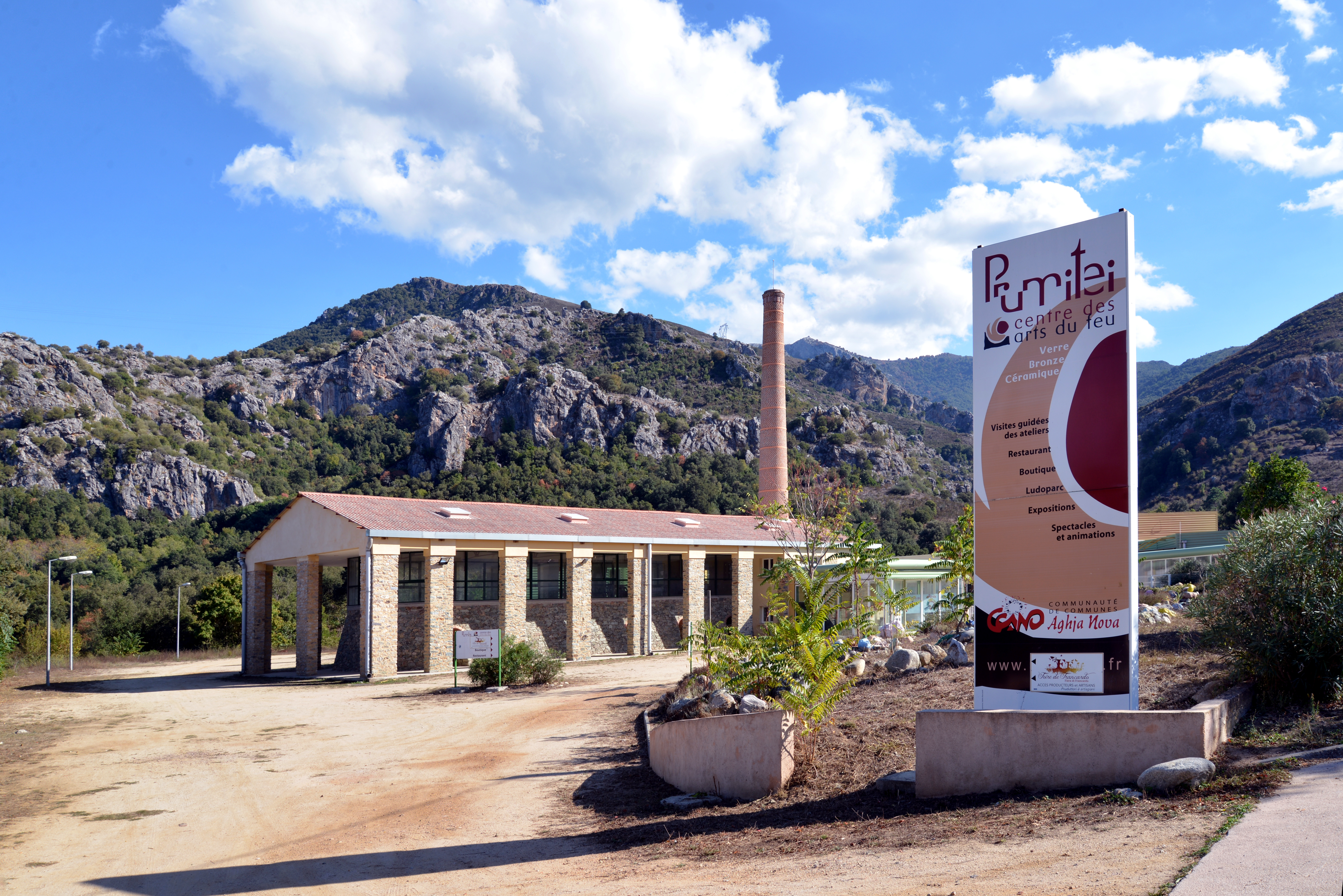 Omessa, Talcini (Corse) - Prumitei, centre des arts du feu à Francardo